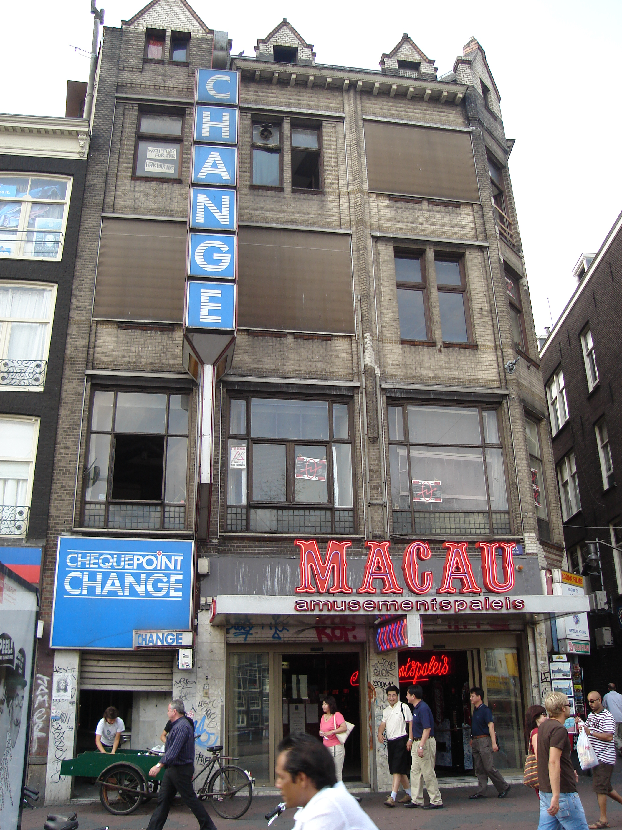 Chequepoint Change